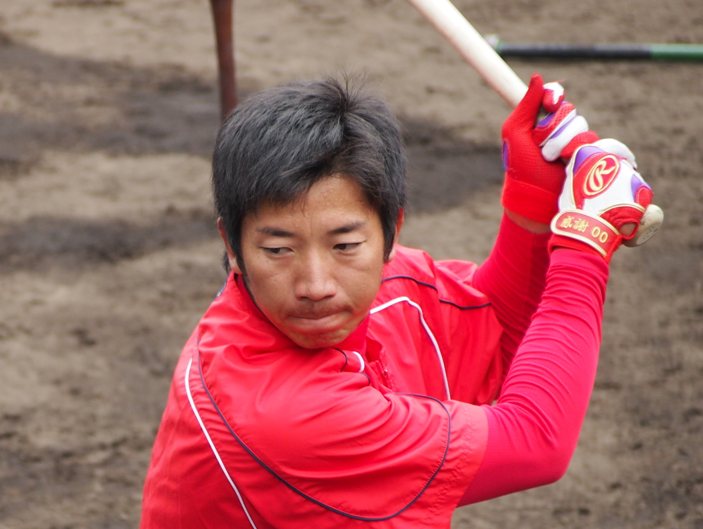 2012年2月24日（日南キャンプにて）Olympus E-PL3 + M.Zuiko Digital ED 40-150mm F4.0-5.6 R